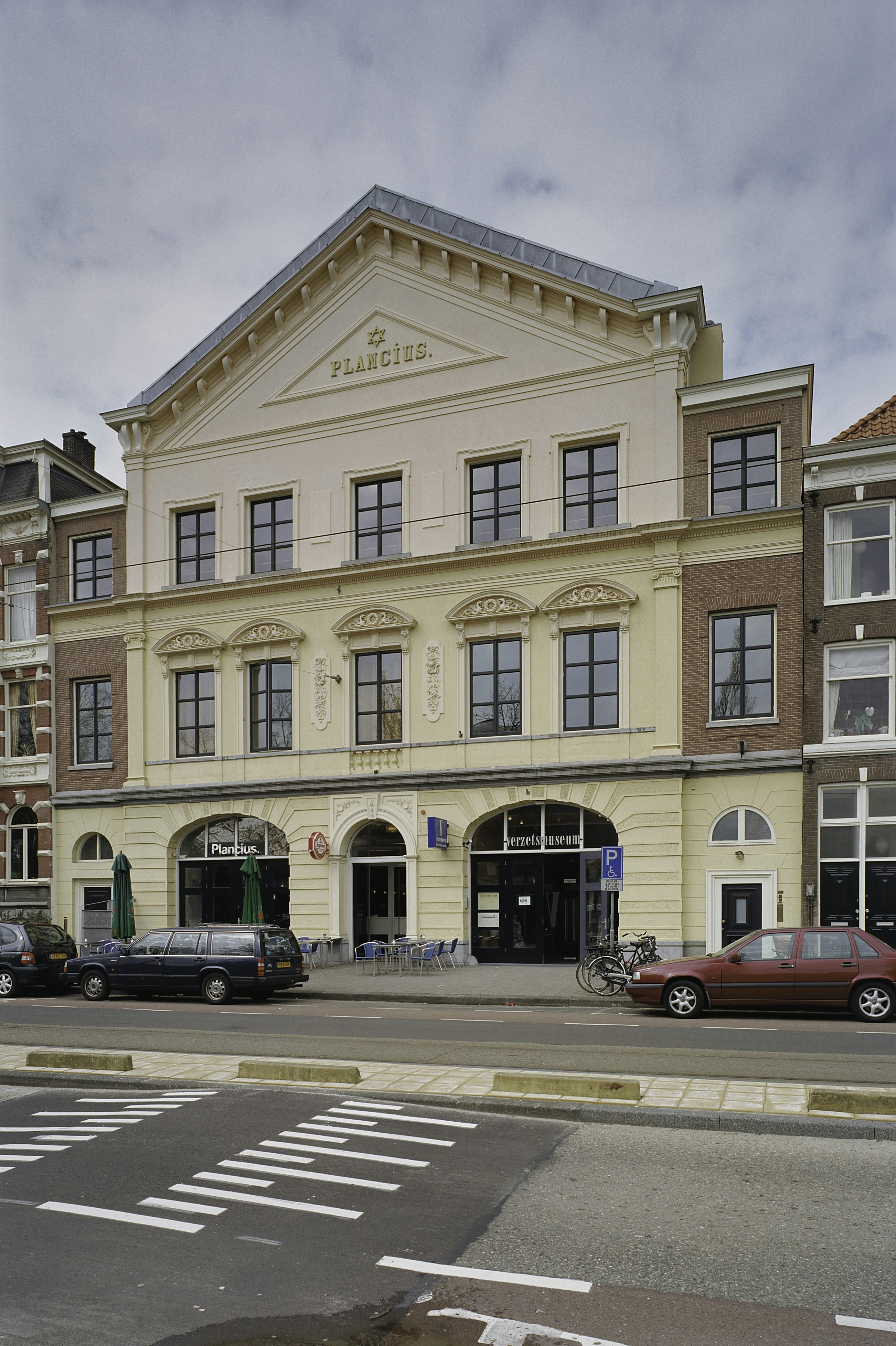 Sociëteit Plancius: Gepleisterde gevel met ingangspartij en op geveltop een kleine Davidster (opmerking: Gefotografeerd voor Monumenten In Nederland Noord-Holland)